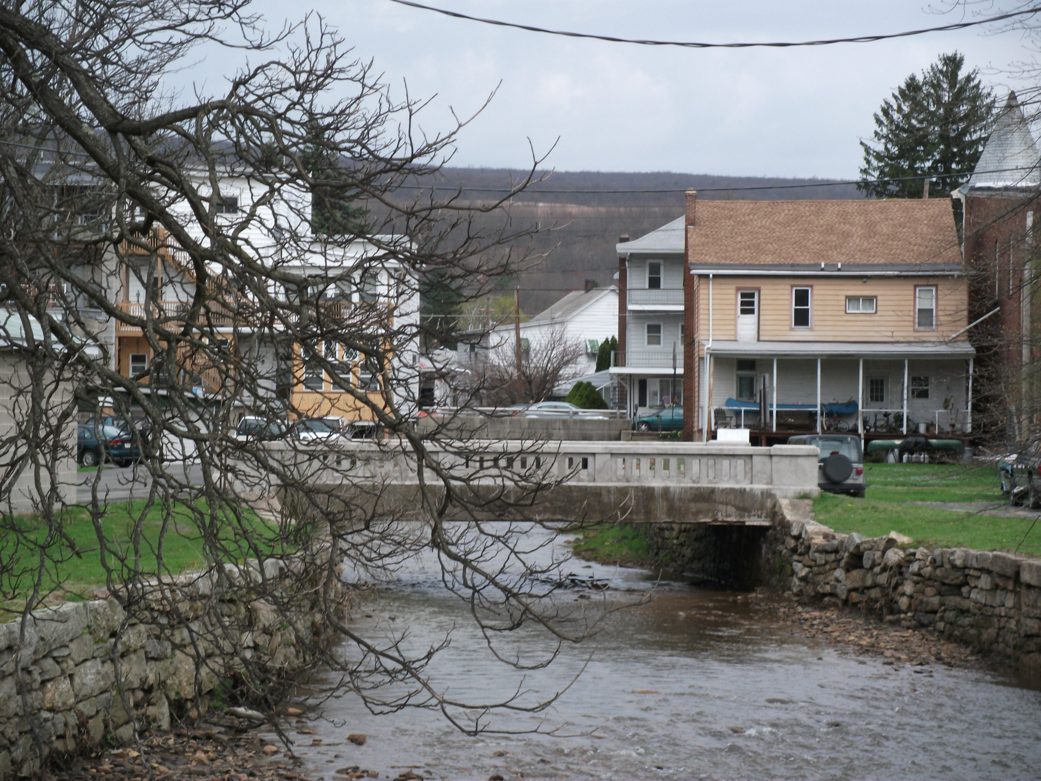 Tremont, Pennsylvania